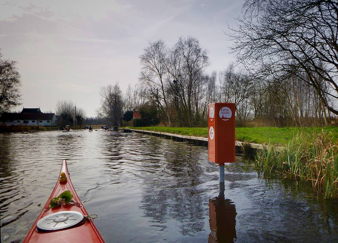 Bij het begin van de in 2018 vernieuwde kanoroute, na overgedragen te hebben bij het sluisje